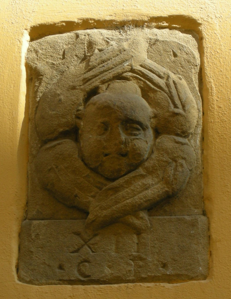 Via del porcellana, angioletto